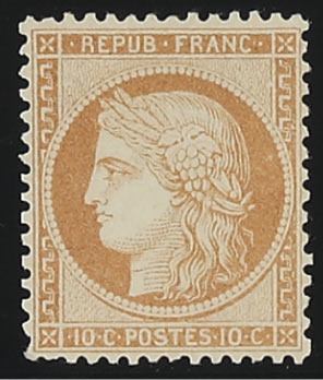 Timbre de France, émission de 1870, 10 centimes bistre-jaune, Cérès, Siège de Paris (IIIe République). Yvert N°36a.